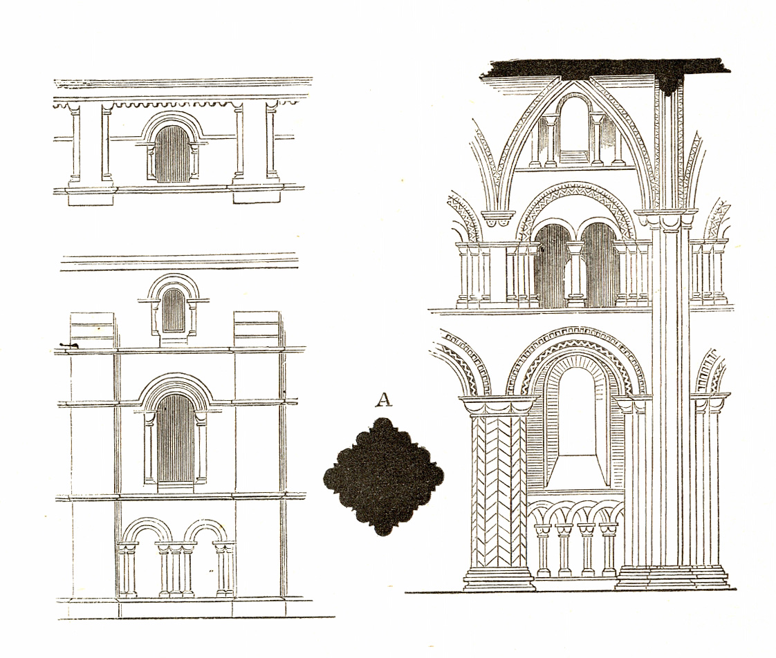 Zeichnung aus dem Jahrbuch der kaiserl. königl. Central-Commission zur Erforschung und Erhaltung der Baudenkmale III. 1859. 1-104. Zuordnung entsprechend Dateinamen August Ottmar Essenwein (1831–1892) Description German architect and writer Date of birth/death2 November 183113 October 1892Location of birth/deathKarlsruheNurembergAuthority control VIAF: 51804595 LCCN: n86016586 GND: 119022192 BnF: cb12551826g ULAN: 500014044 ISNI: 0000 0001 1062 3760 WorldCat WP-Person